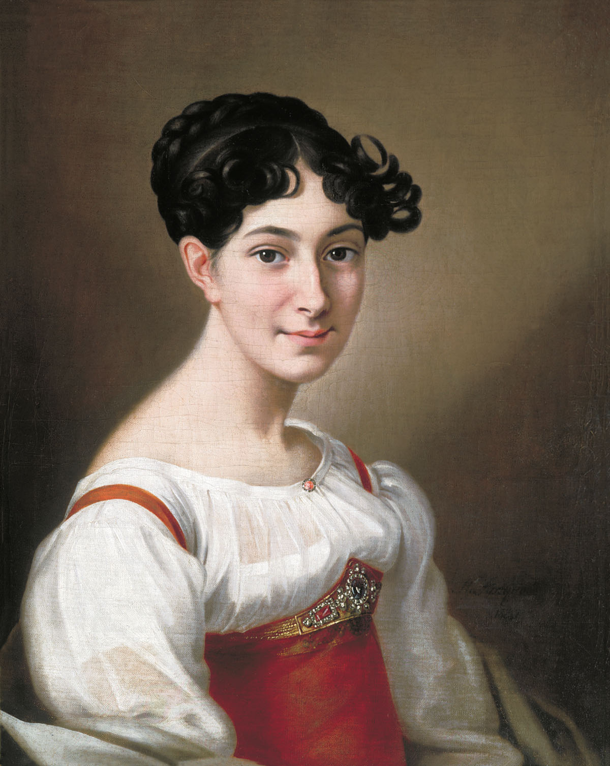 Портрет Елизаветы Ивановны Бантыш-Каменской, незаконная дочь И.С.Барятинского. 1823 год. Холст, масло. Ярославский художественный музей. К числу уникальных произведений из коллекции можно отнести «Портрет Е. Бантыш-Каменской», работы Якова Аргунова (установлено экспертизой в 1988 году во ВНИИРе, эксперты М.Красилин, Б.Лукьянов), приписываемый ранее его брату, более известному крепостному художнику Николаю Аргунову. Так считал и В.В.Ашик, хотя кроме авторства портрет привлекал его личностью изображенной. Не случайно на подрамнике — целая биография: «Портрет Елизаветы Ивановны Бантыш-Каменской (1798–1834) рожд. Бибитинской, дочь кн. Барятинского и Ан. Бибиковой, мать С.Д.Кузиной, умершей в Петербурге в 1907».